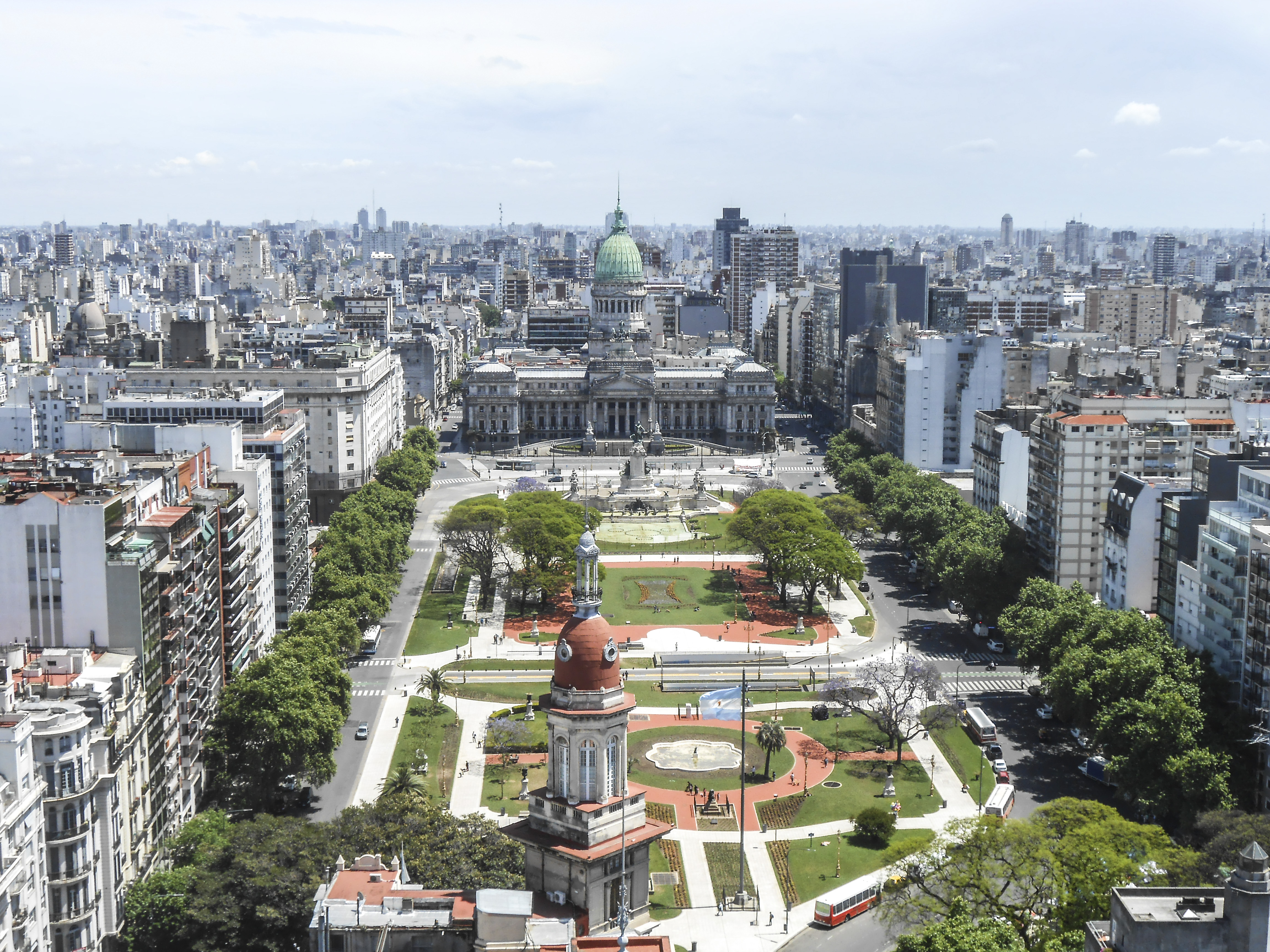 Edificio: Palacion Barolo